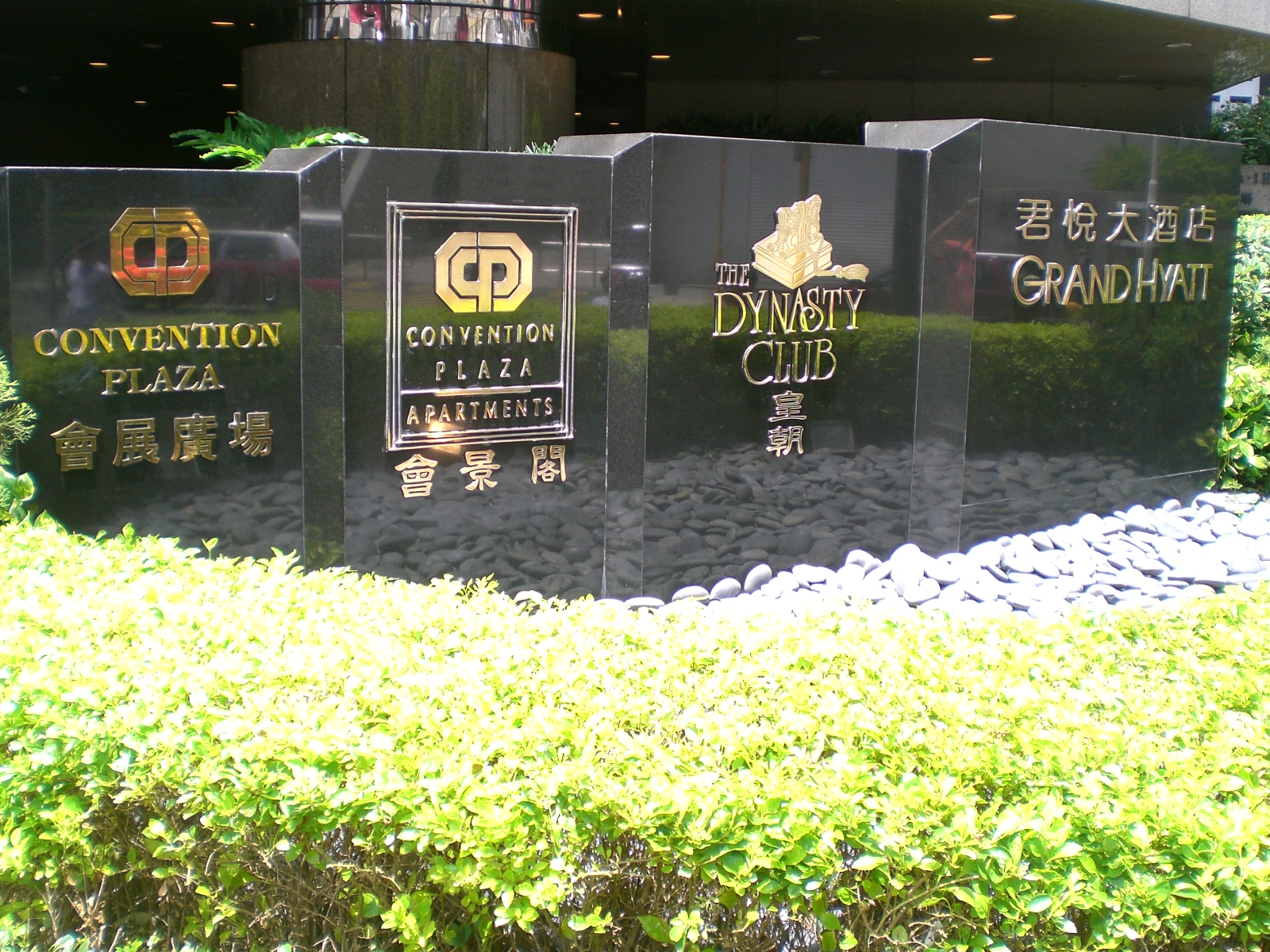 香港君悅酒店, Grand Hyatt Hong Kong, Wan Chai, Hong Kong.